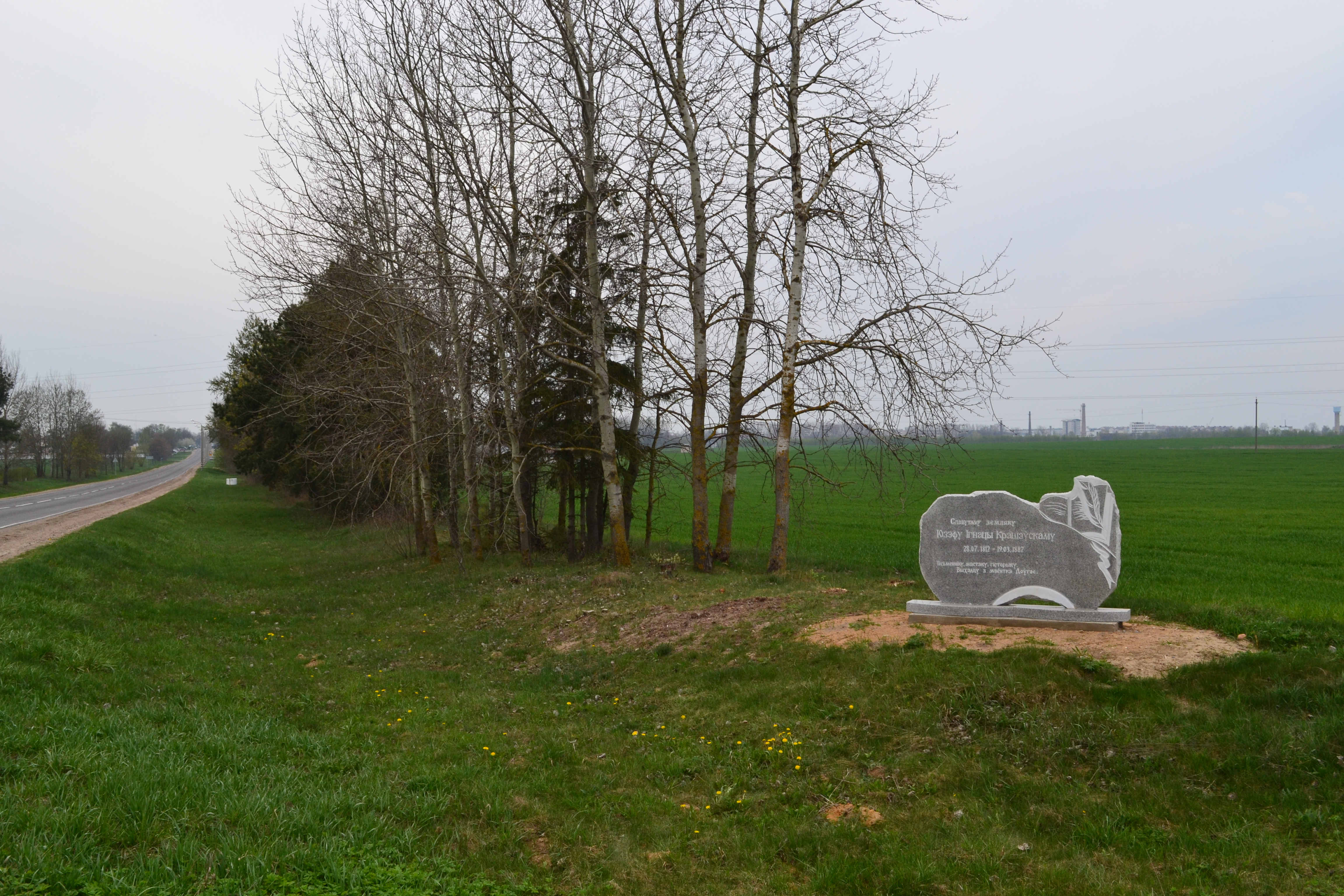 Беларуская (тарашкевіца): Помнік Язэпу Крашэўскаму пры дарозе Пружана — Малеч, ля павароту на Круглае